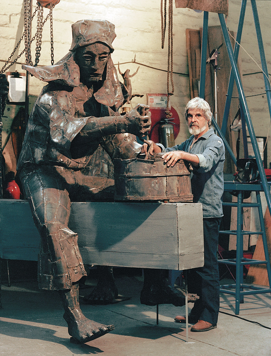 El Escultor Justo Arosemena junto a una de sus obras de espacio publico: Monumento a los Obreros.